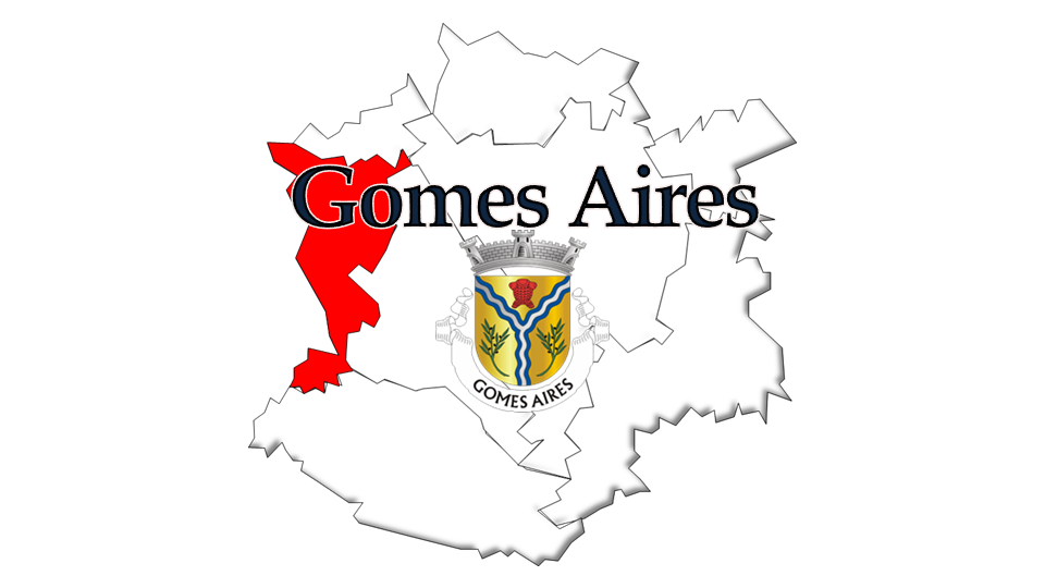 Evolução da População